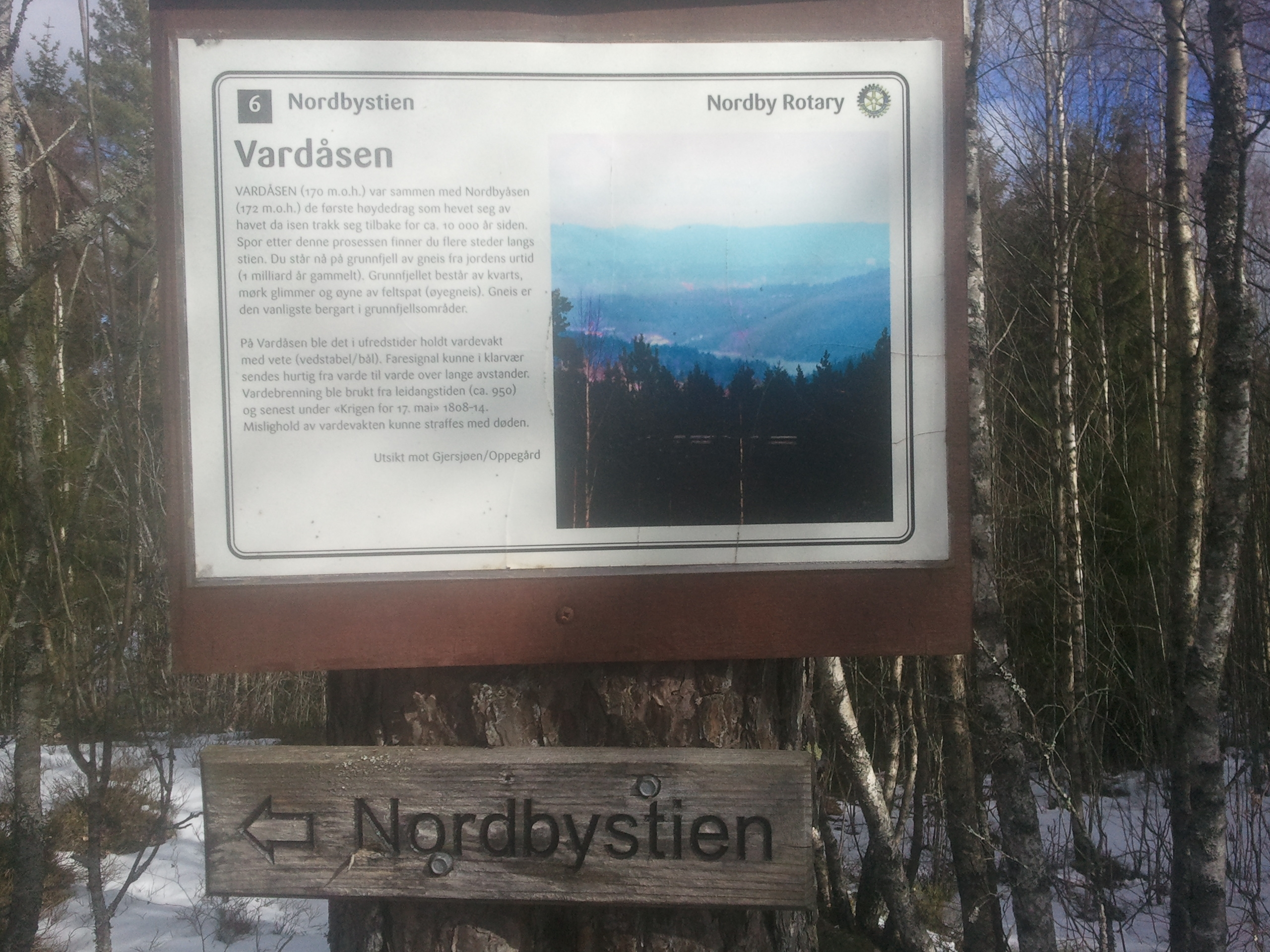 Oppslag ved Vardåsen i Nordby (Ås).